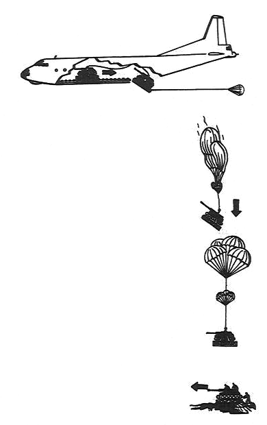 ASU-57's paradropping sequence from An-12 transport plane